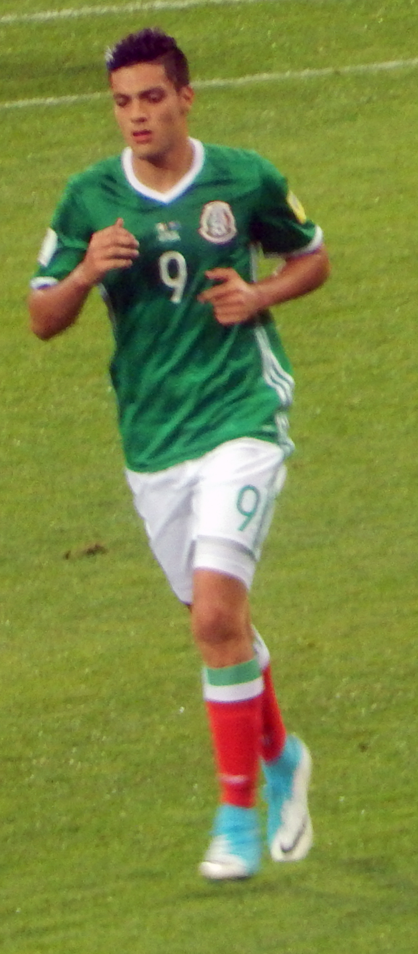 Рауль Хименес в матче против сборной Новой Зеландии